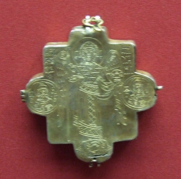 КОВЧЕГ-МОЩЕВИК НАПЕРСНЫЙ С ОБРАЗАМИ АРХАНГЕЛА МИХАИЛА И СВЯТИТЕЛЯ НИКОЛАЯ ЧУДОТВОРЦА Первая половина XIII века – внутренний ковчежец. Первая четверть XIV века – внешний ковчег Тверь (?) – внутренний ковчежец Серебро; чеканка, резьба, золочение 6,6 х 6,2 (внутренний ковчежец); 11 х 10,4 (внешний ковчег) Поступил в 1920 году Происходит из Благовещенского собора Московского Кремля ММК инв. МР-3318/1–2 Ковчег-мощевик серебряный, золоченый, в форме квадрифолия с резными изображениеями архангела Михаила, святых Николая, Бориса и Глеба. Внутри ковчега-мощевика размещался еще один меньшего размера. По предположению исследователей, во внутреннем ковчежце могли находится святыни, привезенные в 1218 году из Константинополя великому князю Константину Всеволодовичу. А его праправнучка Анна Дмитриевна, получив реликвии по-видимому в приданом, заказала внешний ковчег тверским мастерам в память о своем муже великом князе Михаиле Ярославовиче, после его гибели в Орде в 1318 году. Происходит из Благовещенского собора Московского Кремля.